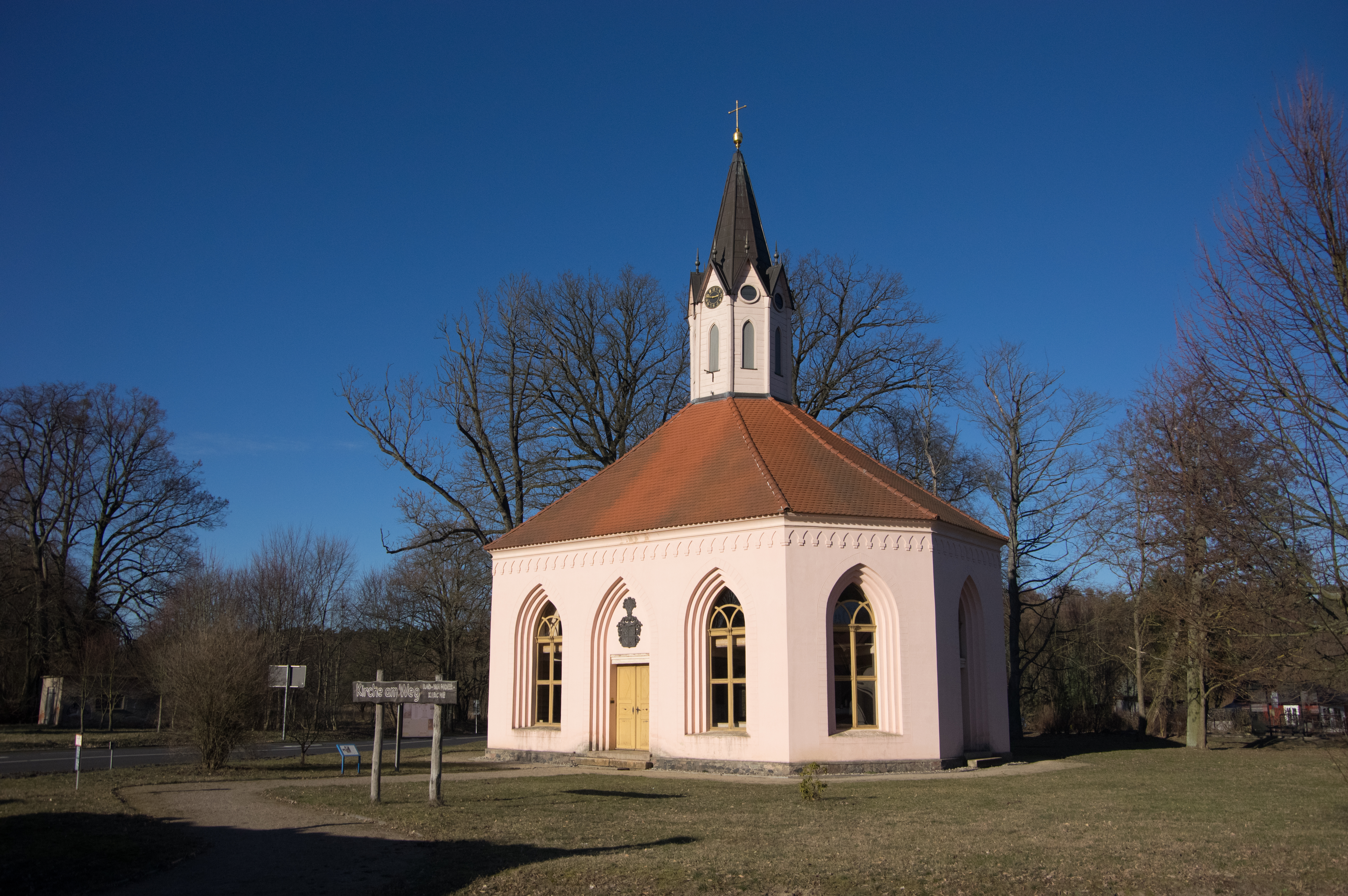 Gransee, Ortsteil Dannenwalde. Die steht unter Denkmalschutz.